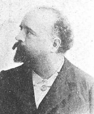 Manuel Reina y Montilla (por Compañy). Ilustre poeta fallecido el día diez del actual en Puente Genil.